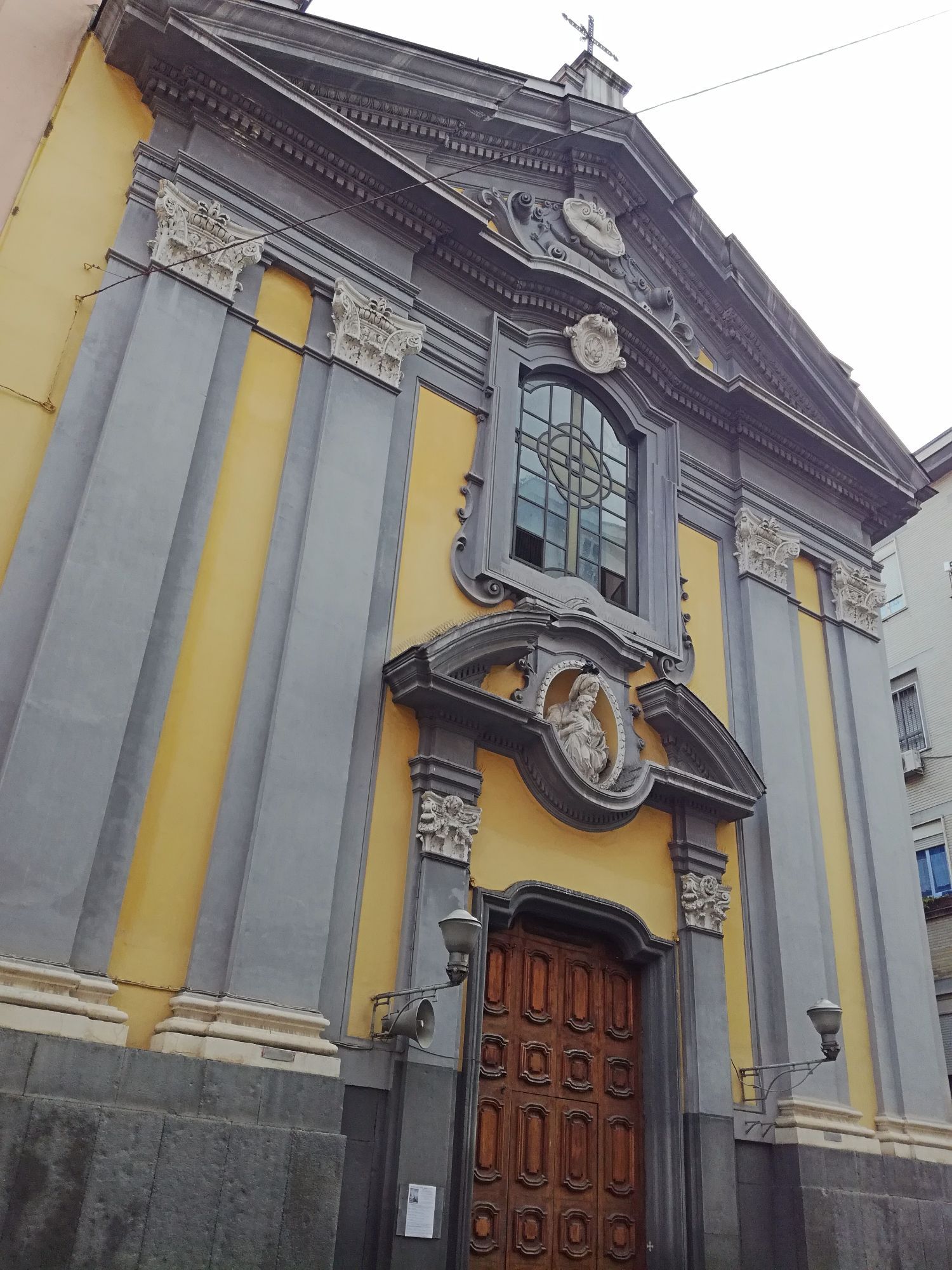 Chiesa di Santa Maria della Scala (Napoli)